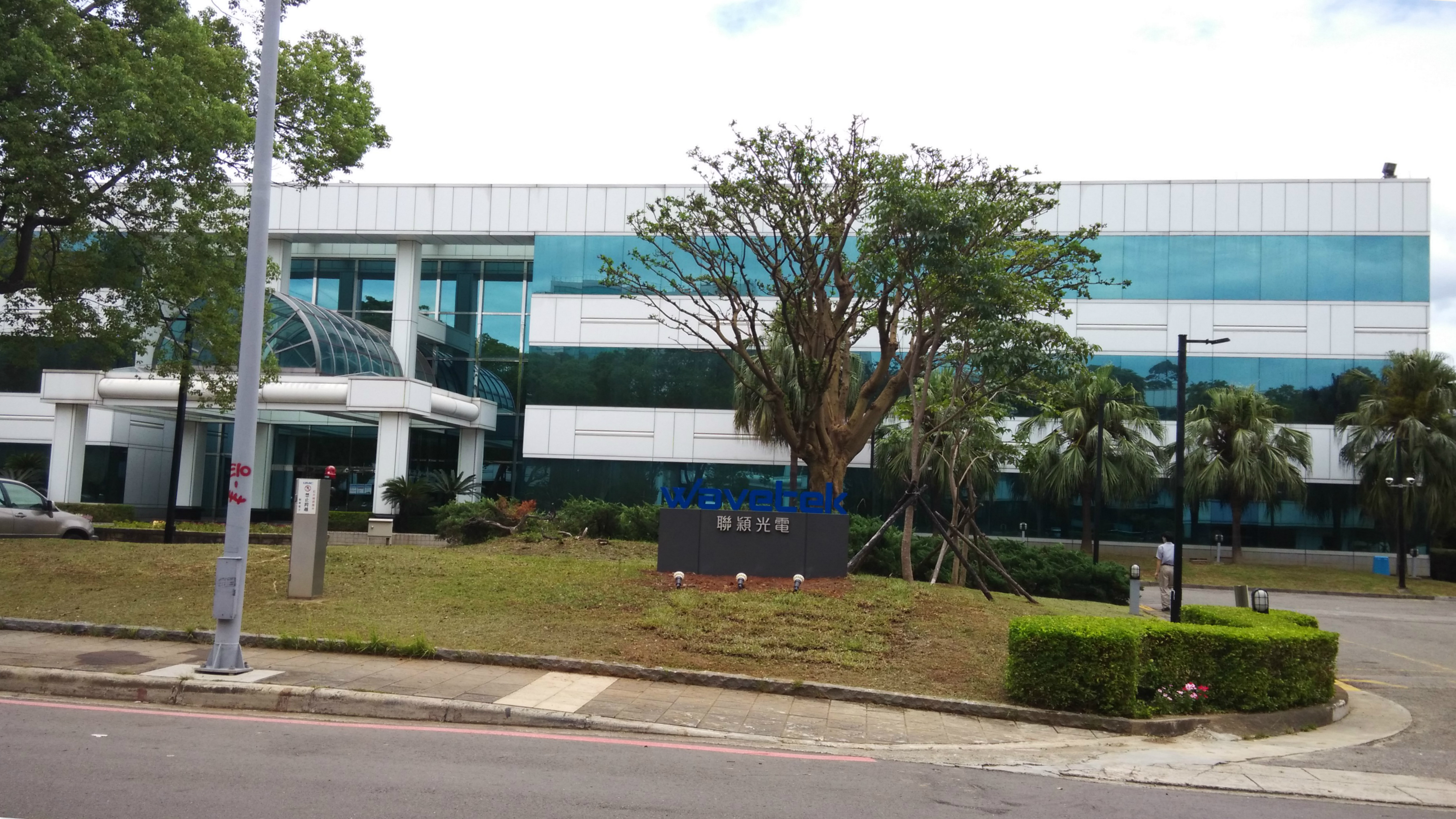 中文（台灣）: 聯穎光電總部，位於新竹科學工業園區創新一路10號，原聯華電子6A廠。